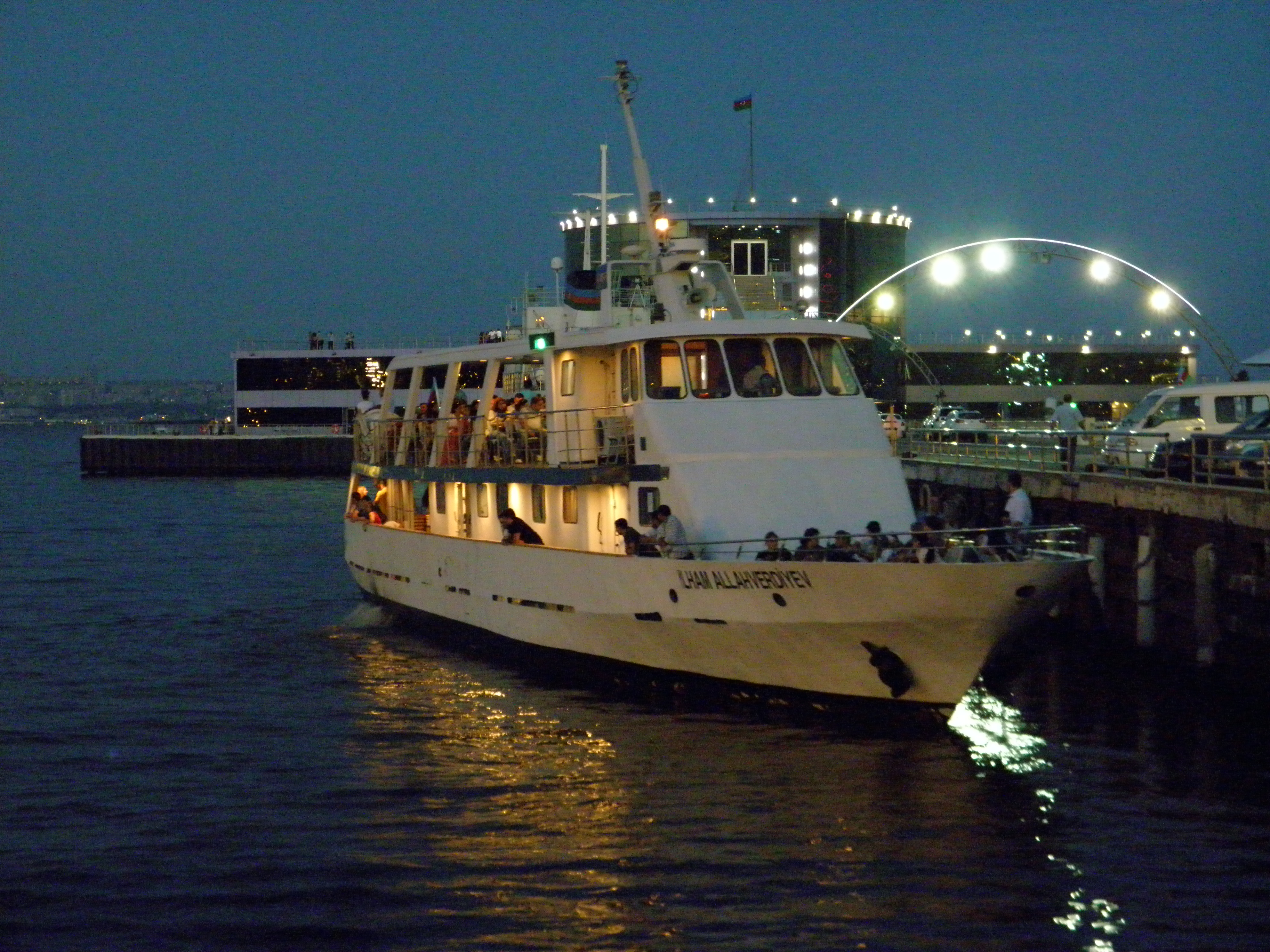 Катер "Ильхам Аллахвердиев" на Бакинском Бульваре